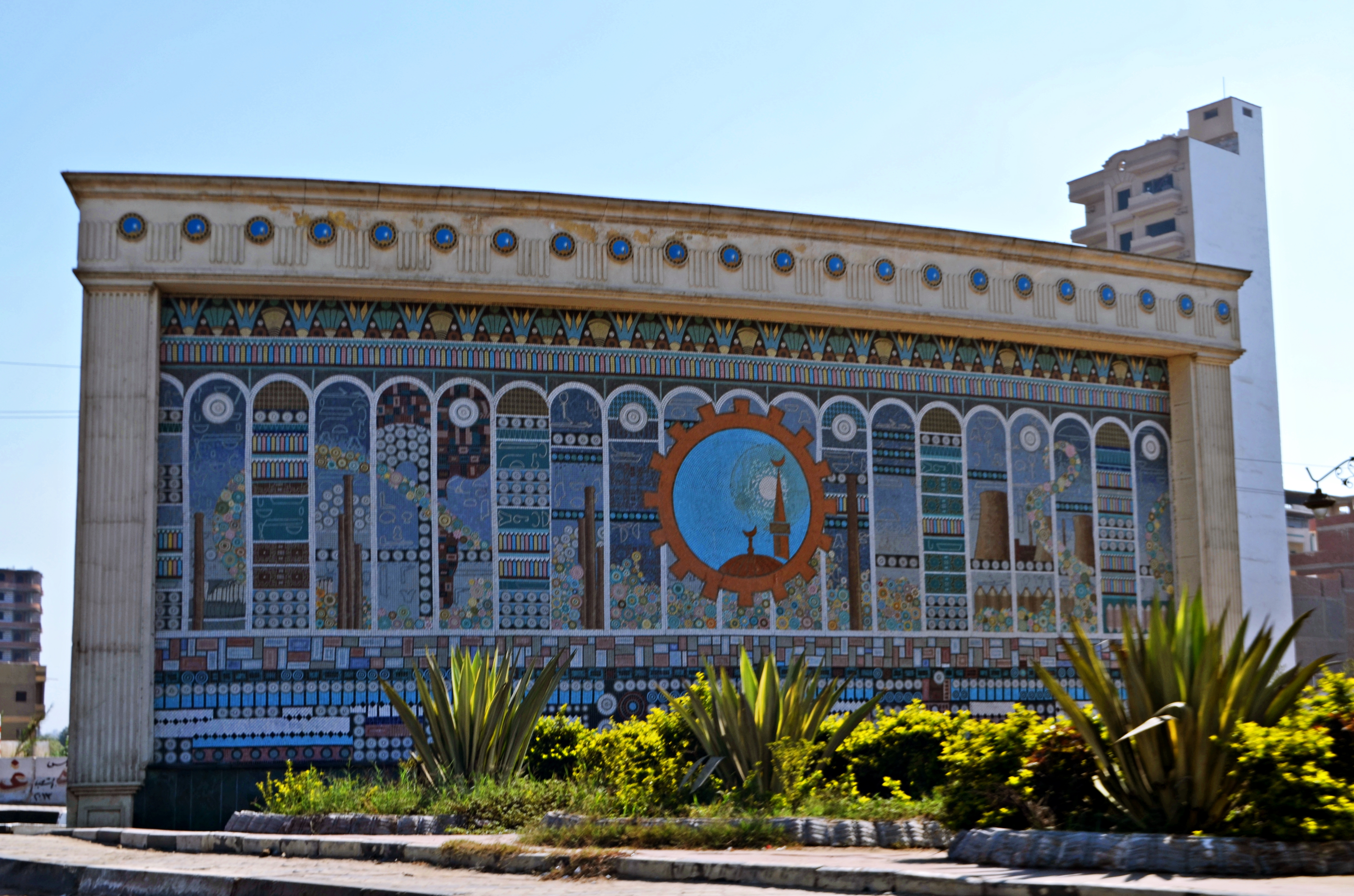 جدارية على مدخل مدينة المحلة الكبرى، محافظة الغربية، مصر